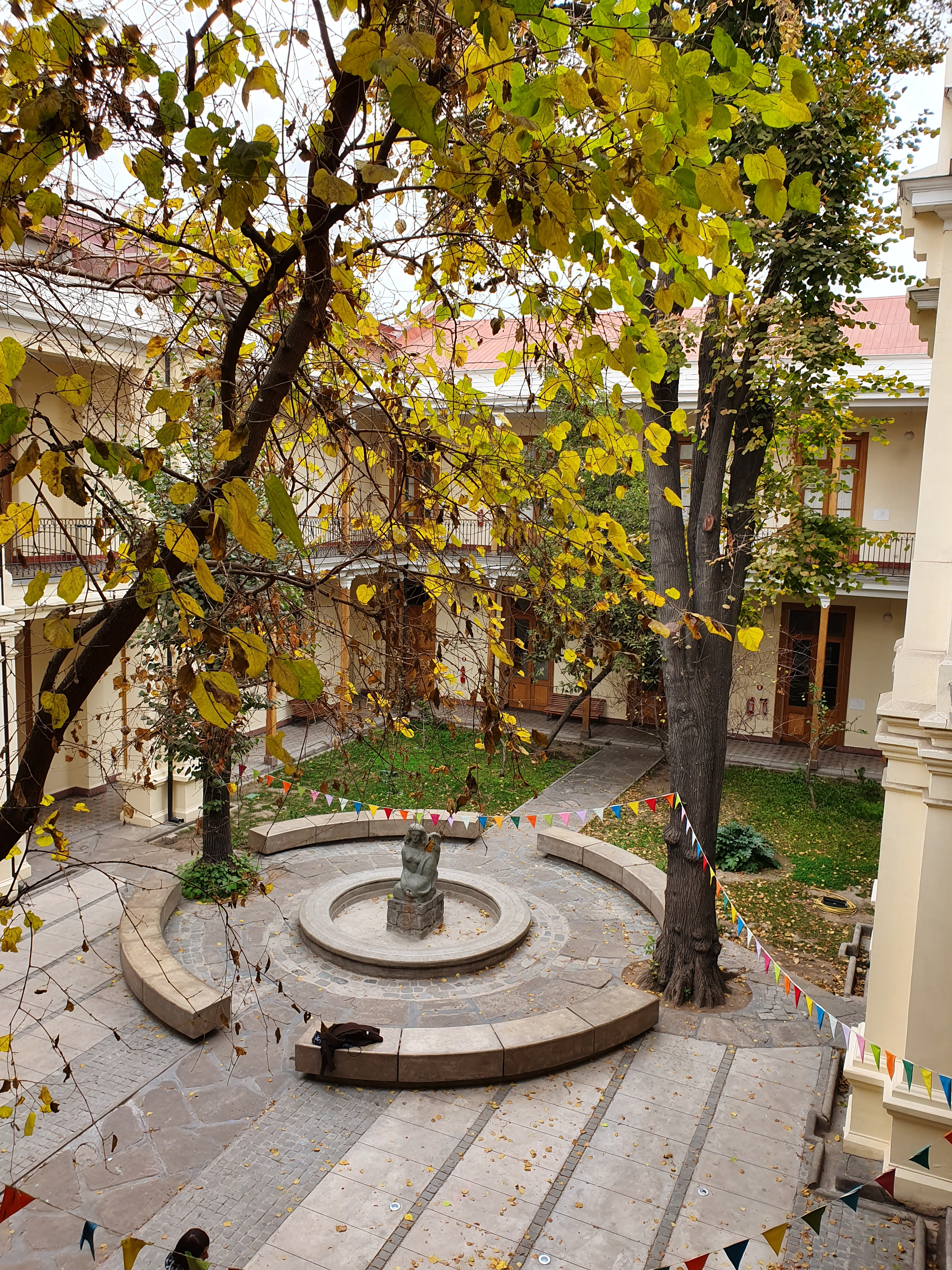 Vista superior del patio interior del Museo de la Educación Gabriela Mistral, en Santiago de Chile.